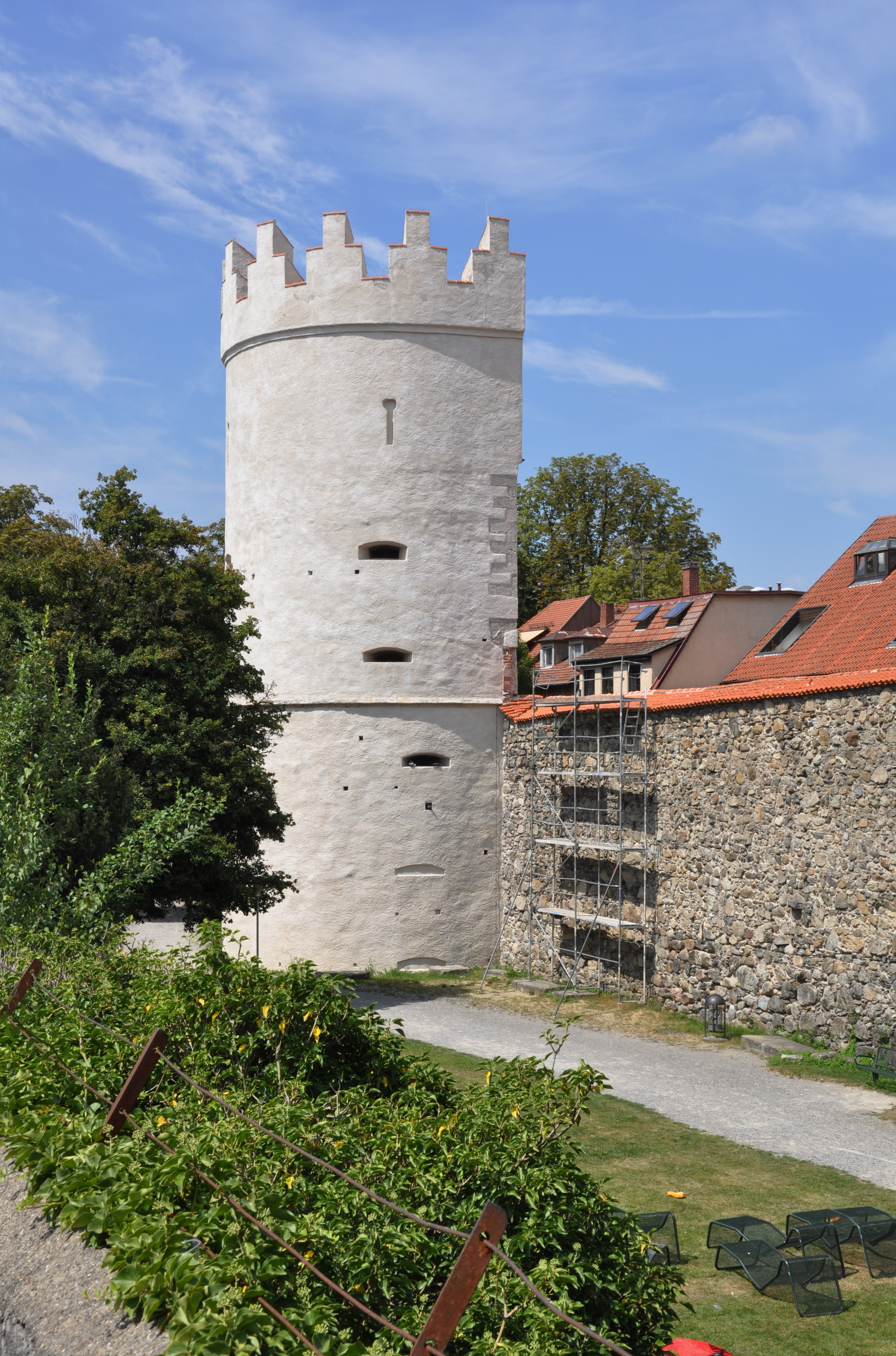 Ravensburg, Hirschgraben, Wehrturm